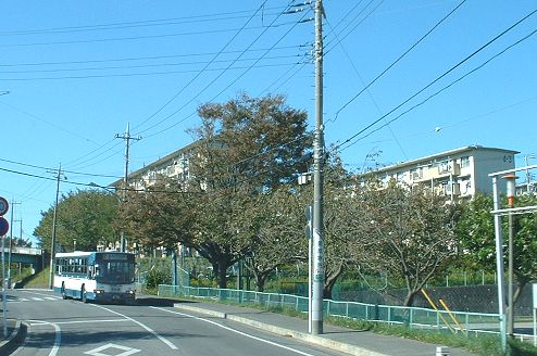 Hanamigawa danchi line of Keisei bus